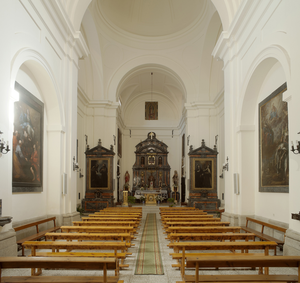 unidentified Cultural Heritage Spain